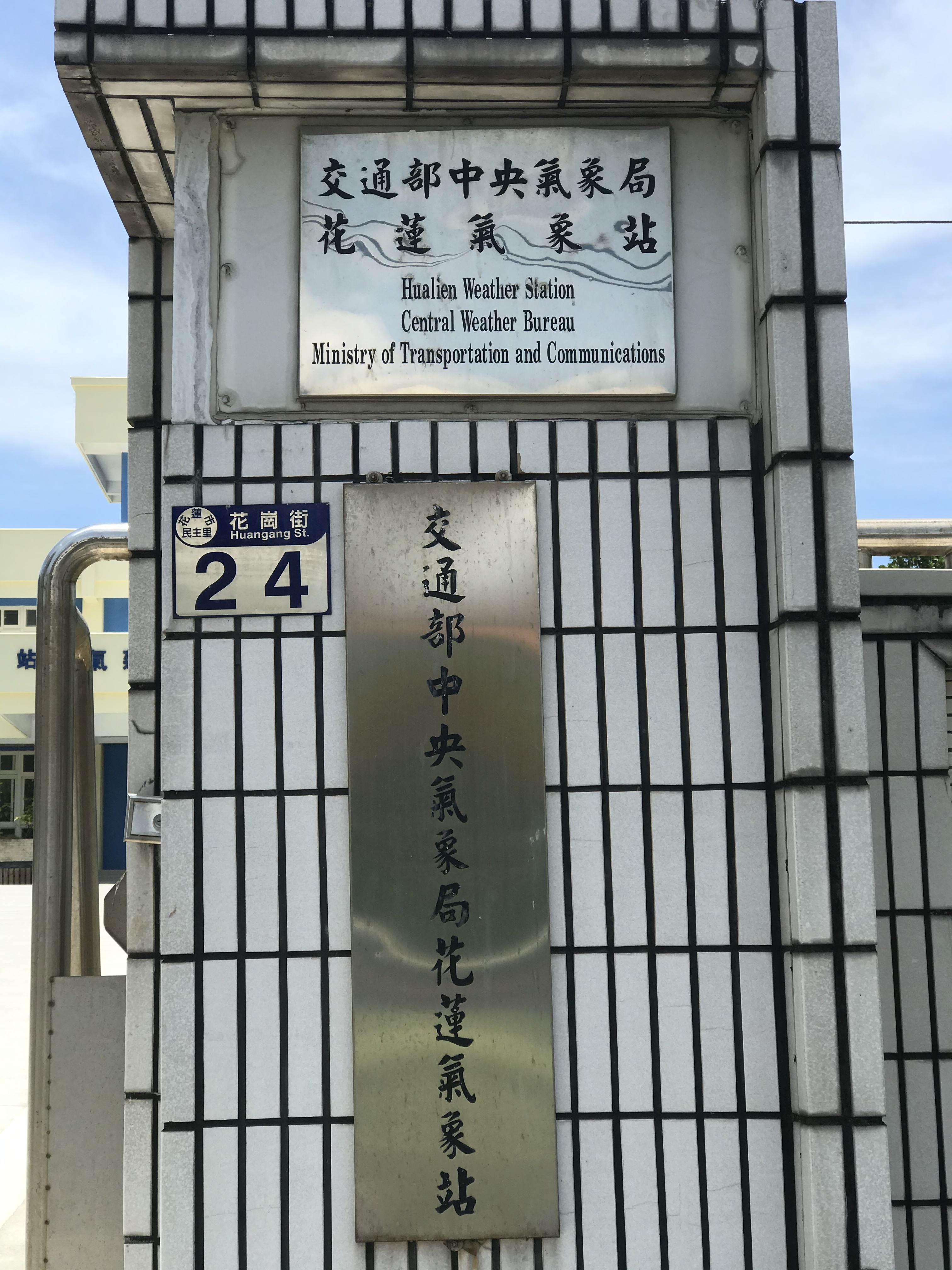 中文（台灣）: 交通部中央氣象局花蓮氣象站門牌